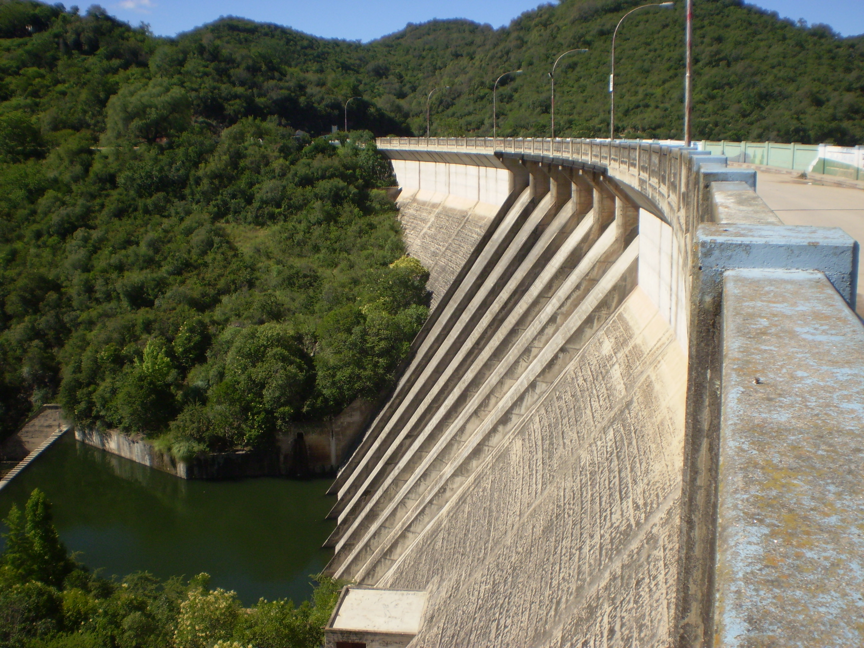 Dique La Quebrada (Río Ceballos, Córdoba, Argentina)